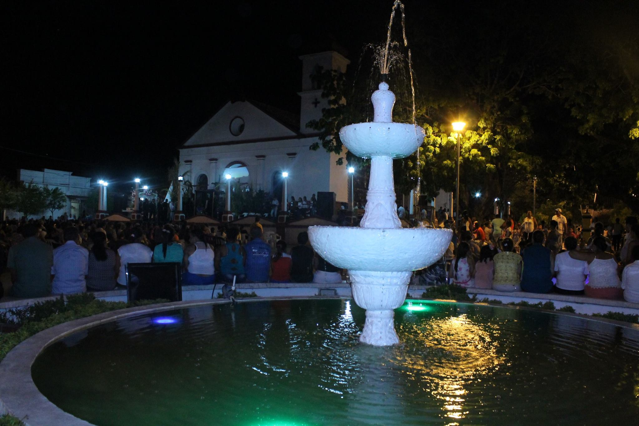 Iglesia San Antonio De Padua de simiti bolivar